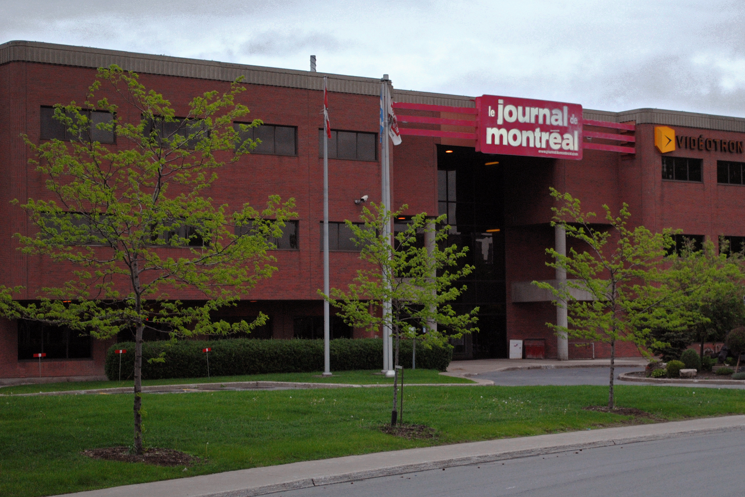 Édifice du Journal de Montréal sur la rue Frontenac, Montréal